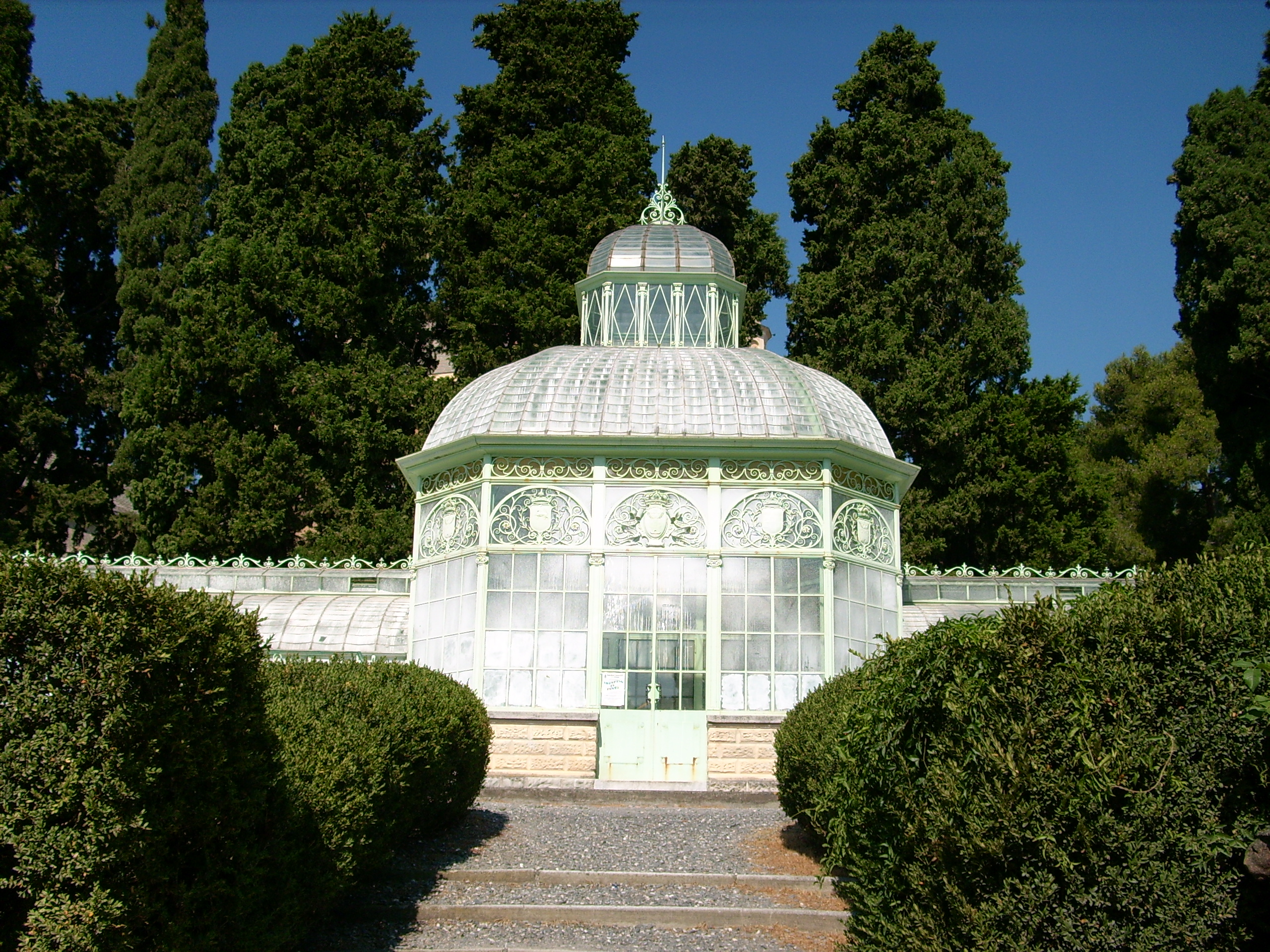 Serre comunali di Arenzano, Liguria, Italia